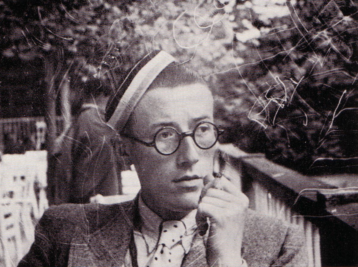 Fotografie von Wilhelm Tochtermann als Fuchs des Corps Gothia